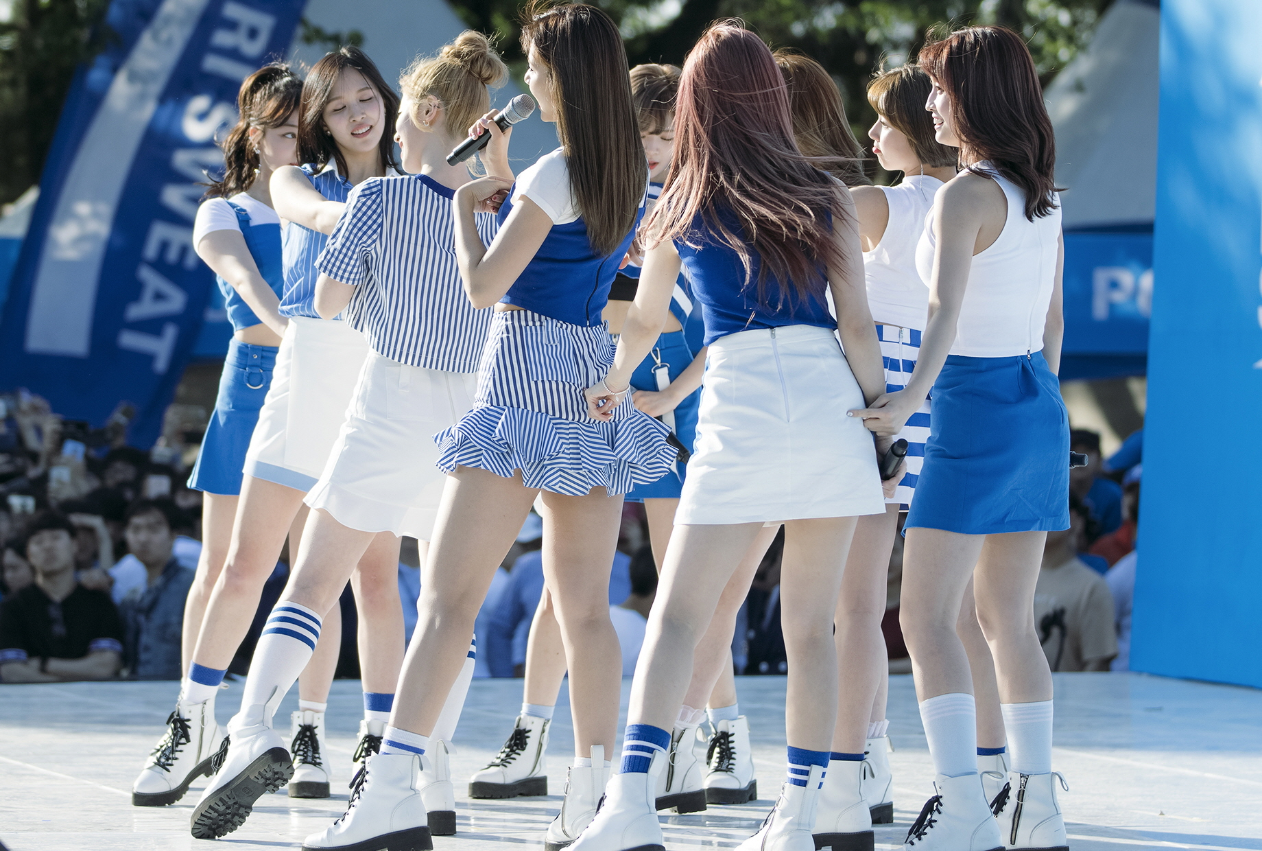 170514 포카리스웨트 30주년 블루런 행사 트와이스